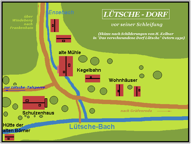 Skizze des Lütsche-Dorfs vor Schleifung